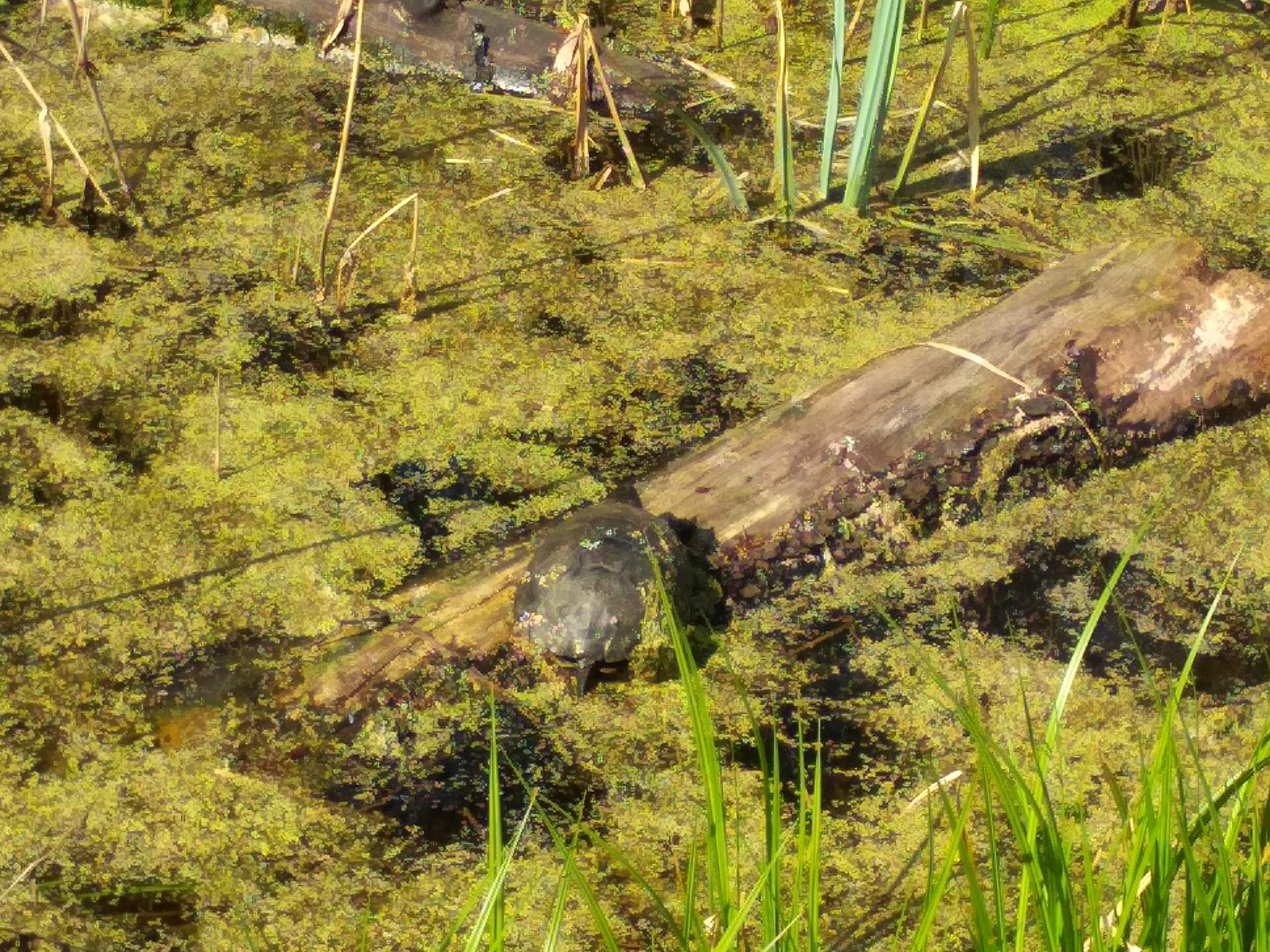 Воронежский заповедник: Территория заповедника расположена на границе Воронежской (Верхнехавский р-н) и Липецкой (Усманский р-н) областей и занимает северную половину островного лесного массива – Усманского бора., Верхнехавский район, Воронежская область This image is related to the protected area of Russia number 3600069